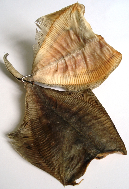 Dreught Fish - Finkenwerder Trockenschollen